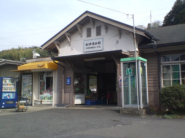 紀伊清水駅 2007年4月6日 投稿者が撮影